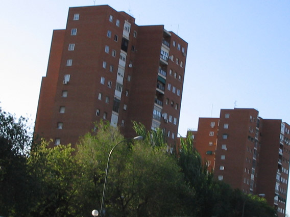 Rascacielos en el norte de la Ciudad de los Ángeles en Madrid.